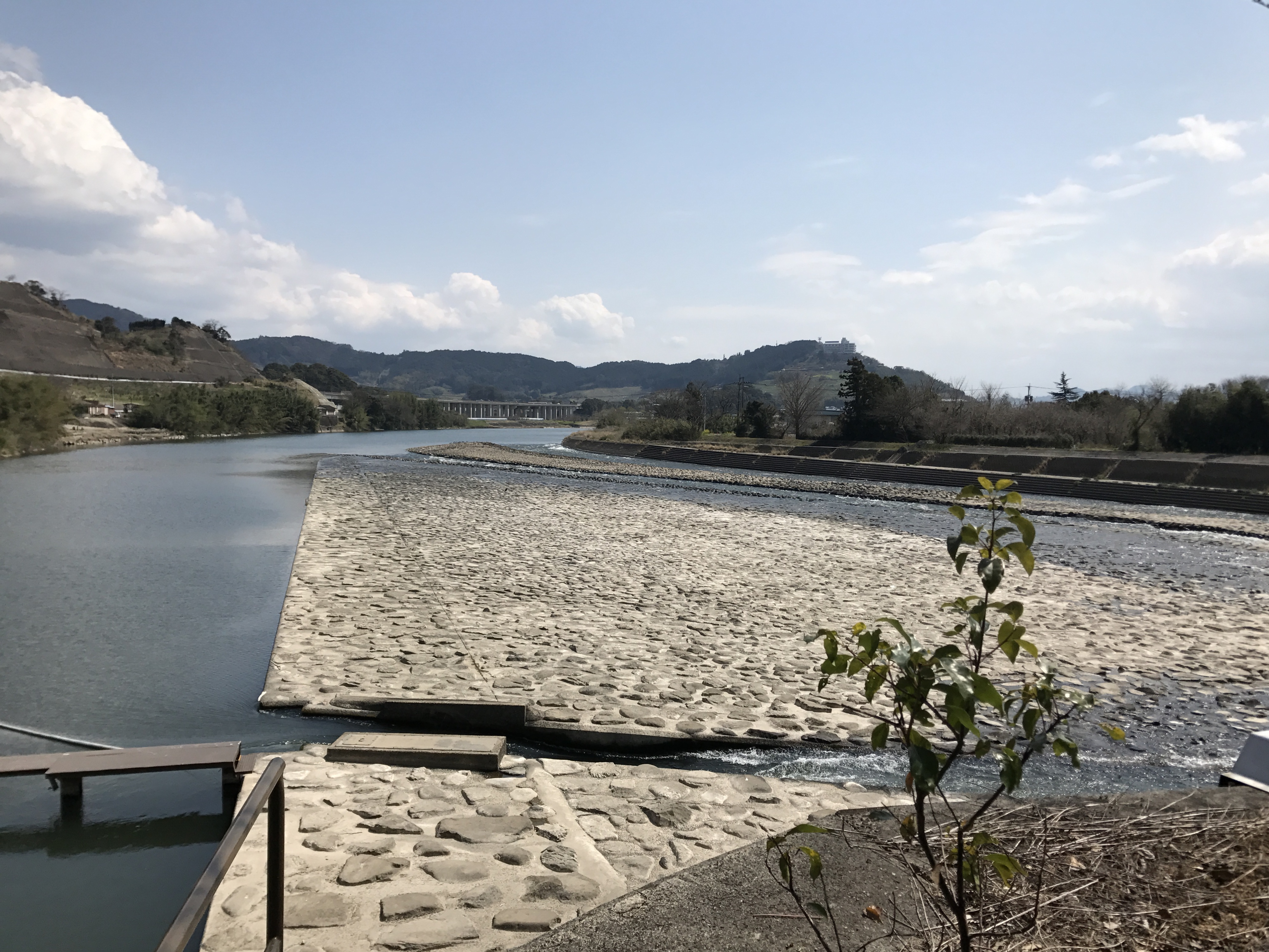 筑後川・山田堰の全景